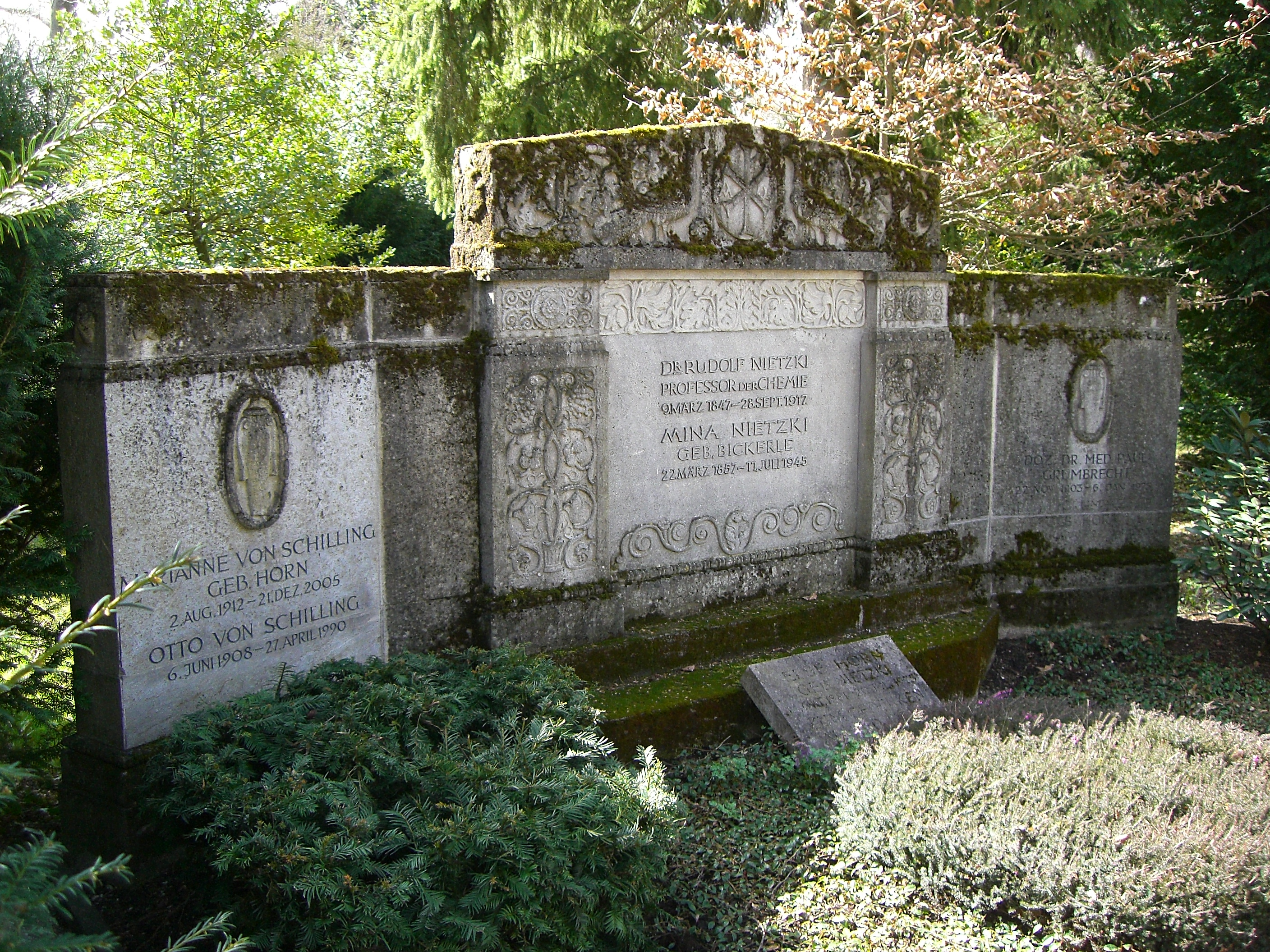 Rudolf Hugo Nietzki (* 9. März 1847 in Heilsberg in Ostpreußen, heute Lidzbark Warmiński, Polen; † 28. September 1917 in Neckargemünd) war ein deutscher Chemiker.